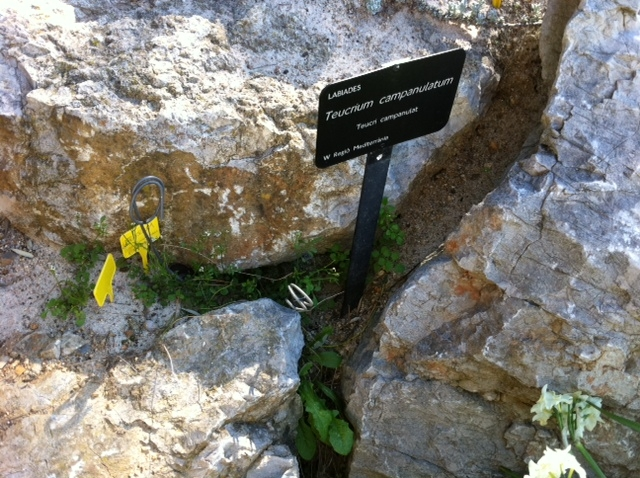 Teucrium campanulatum al Jardí Botànic de Barcelona.